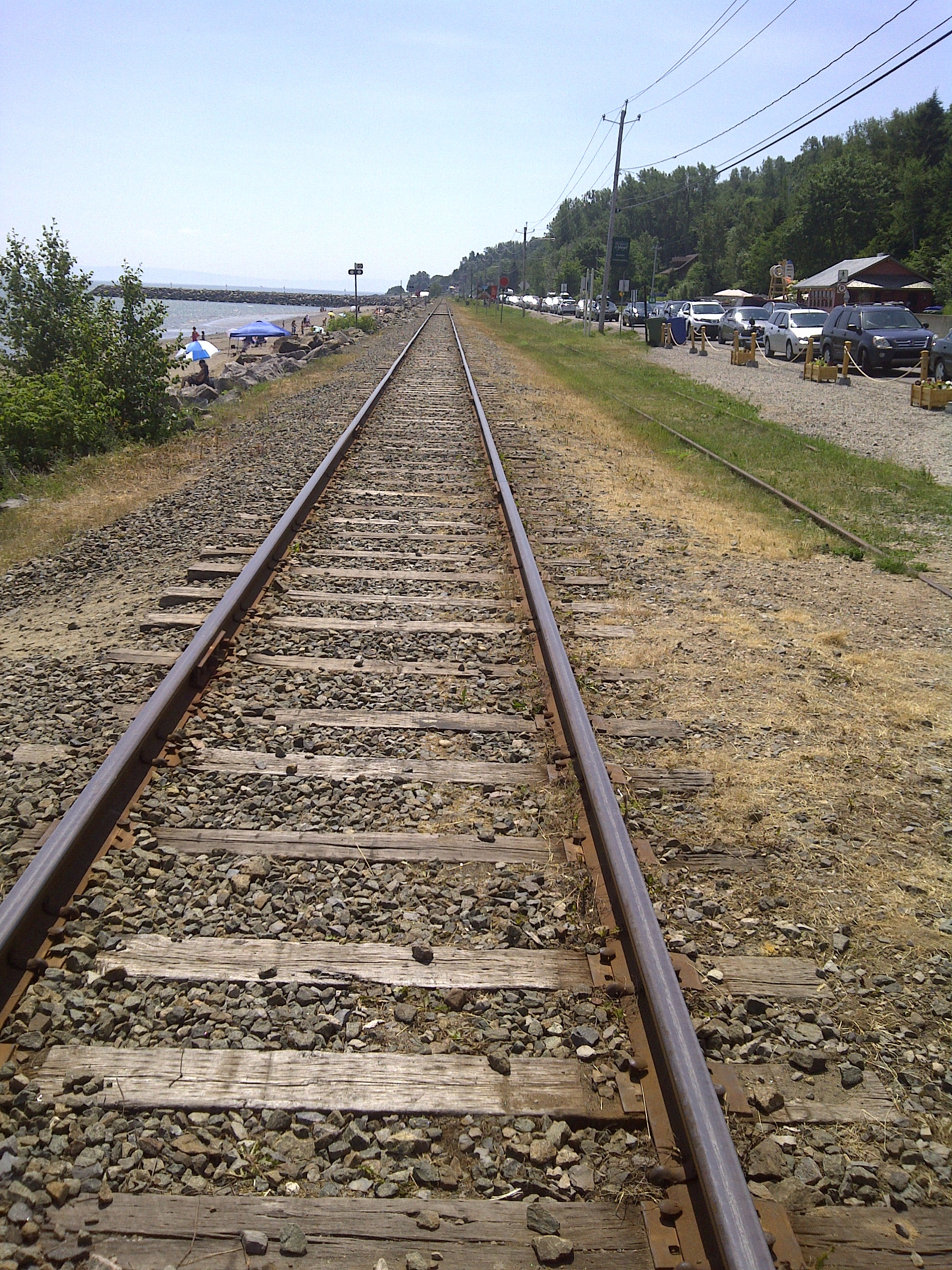 Tronçon de chemin de fer longeant la rive-nord du fleuve Saint-Laurent dans le village de Saint-Irenée, Charlevoix, QC.